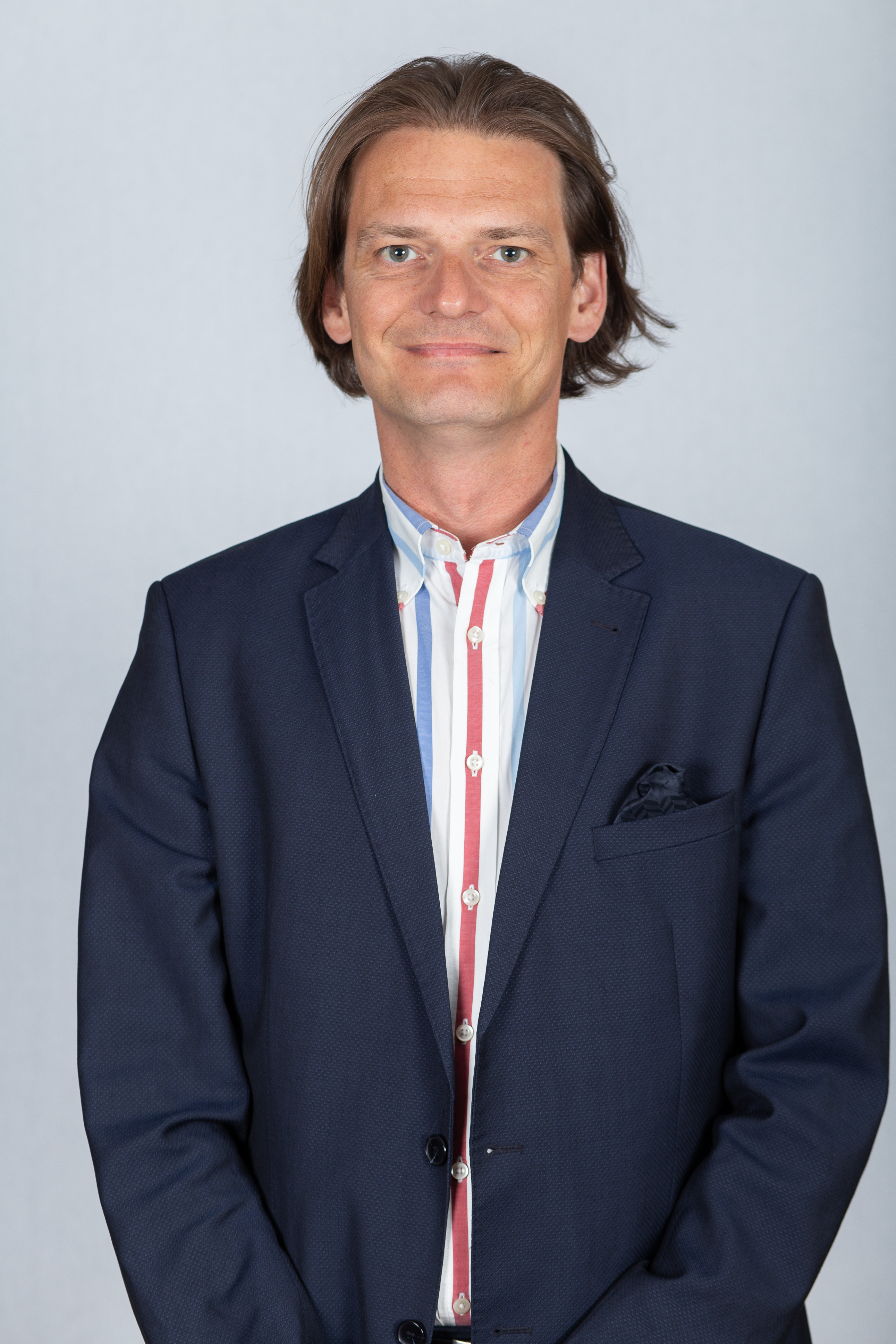 Stefan Gebhardt, MdL Sachsen-Anhalt, Die Linke